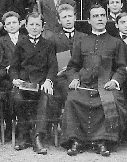 Jakob Franz Alexander Kern (left) as a sopran soloist with Franz Lehner